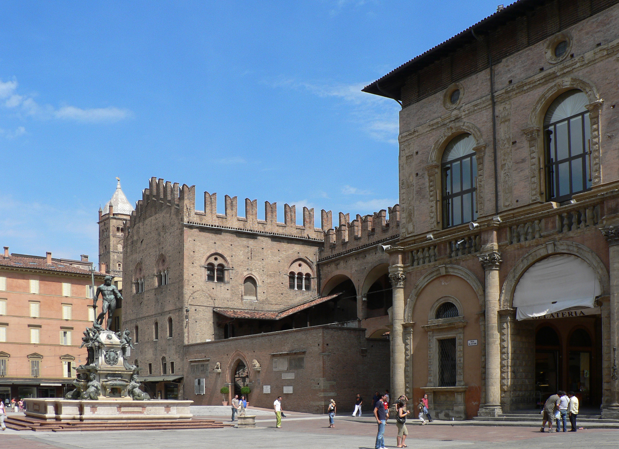 Bologne (Italie), La Piazza Maggiore et la Fontana del Nettuno. Sullo sfondo, il Palazzo di re Enzo.